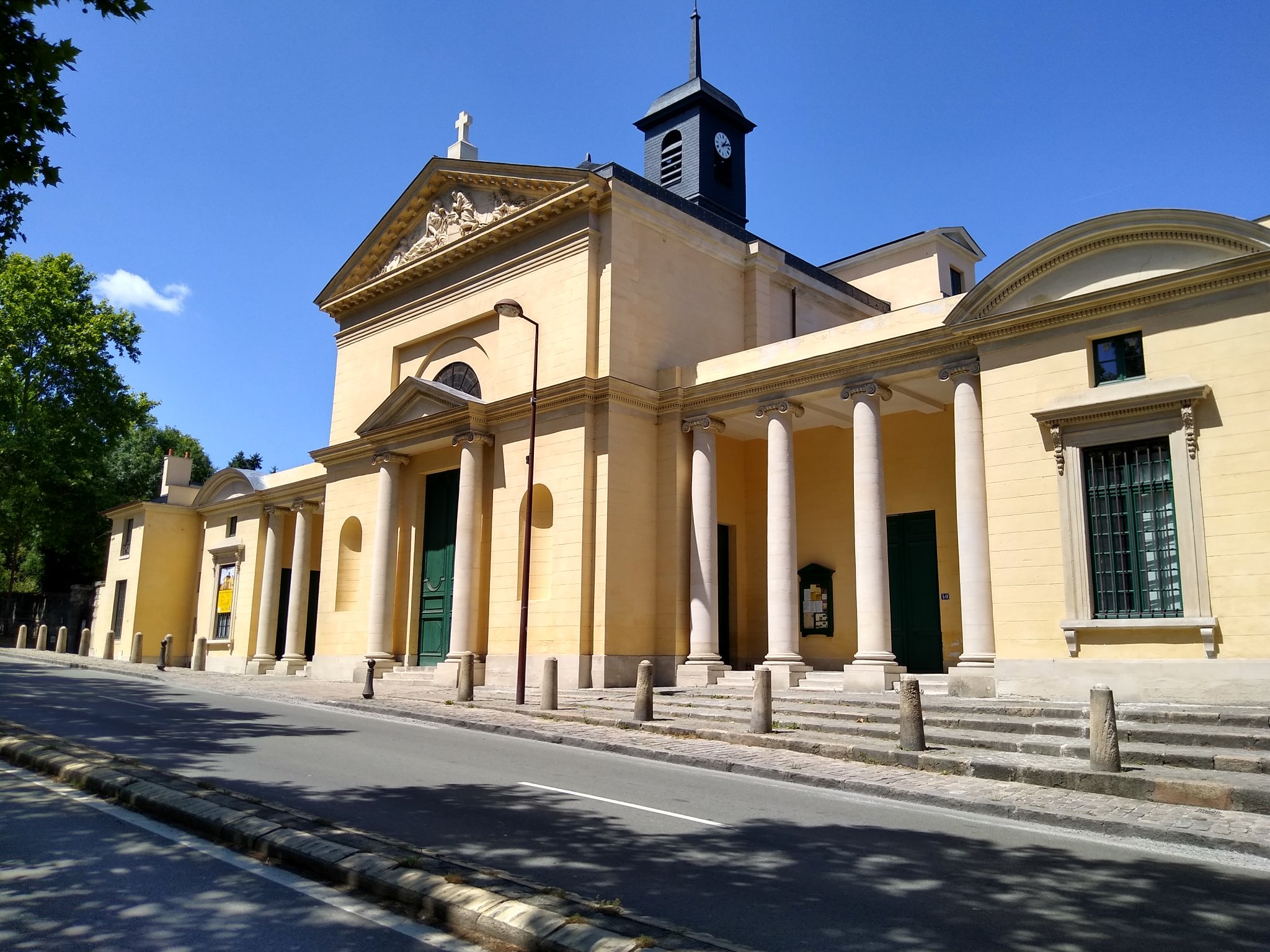 Église Saint-Louis du Port-Marly, après restauration